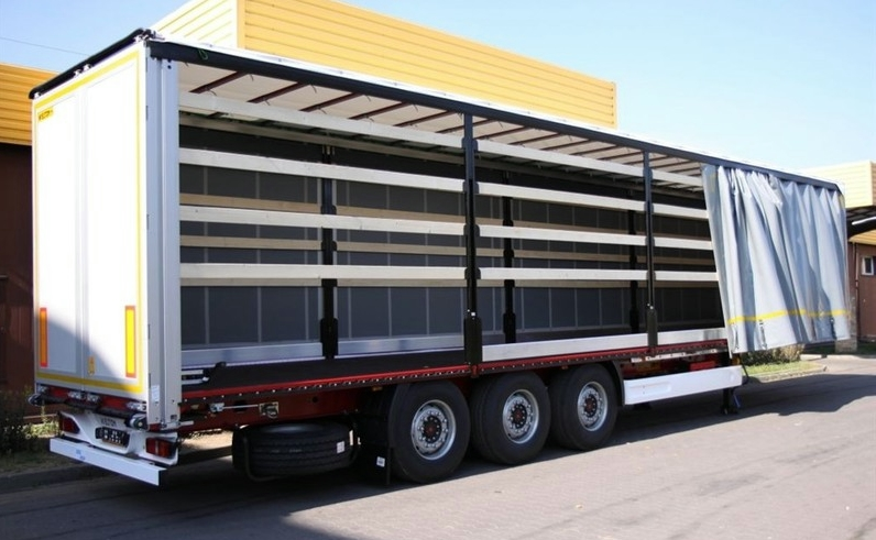 Seitlich geöffneter Planenauflieger des Fahrzeugherstellers Wielton.